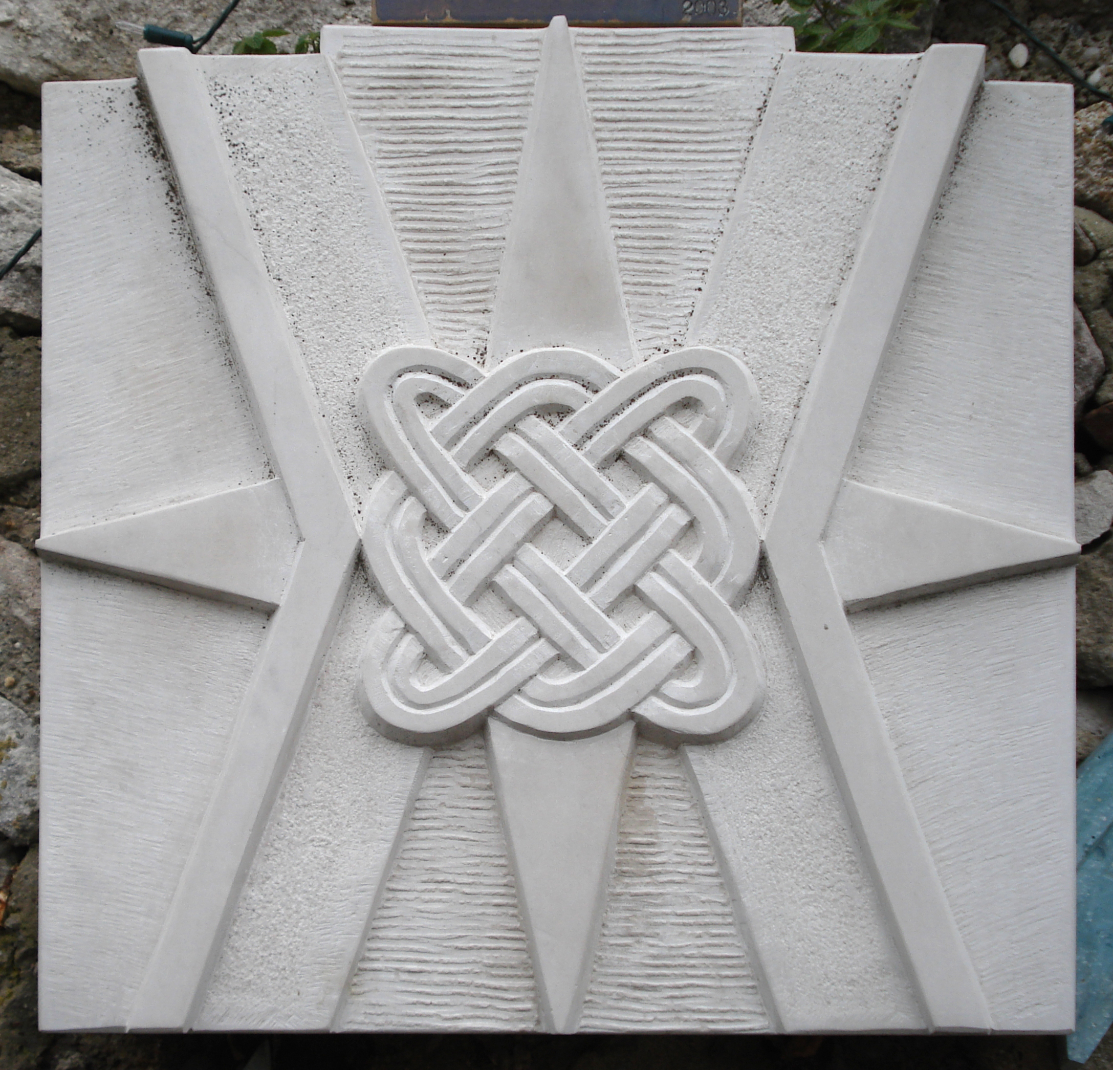 EU-_Burgenland-Kroaten, Werk von Thomas Resetarits.